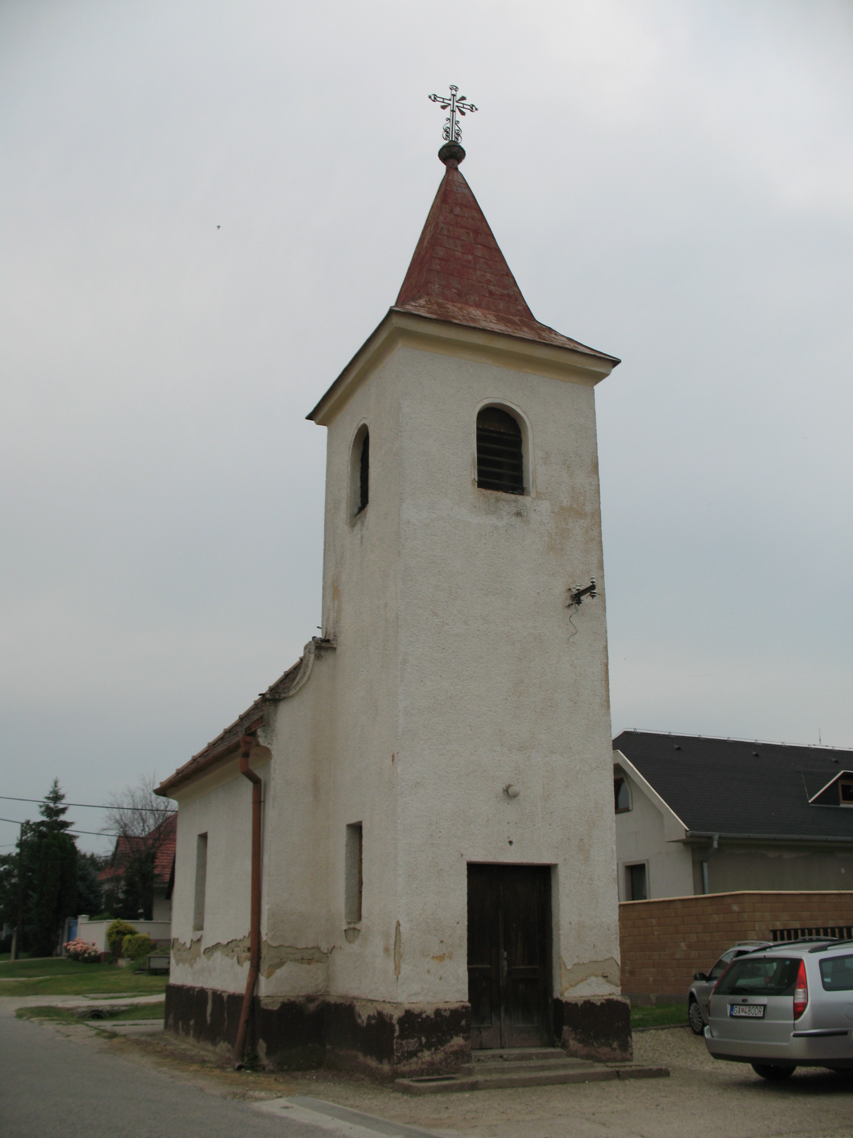 Pusztakürt